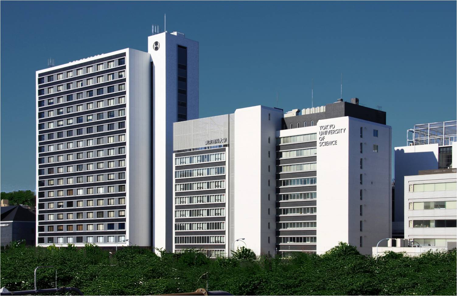 東京理科大学 神楽坂キャンパス 外観 飯田橋駅西口付近より撮影